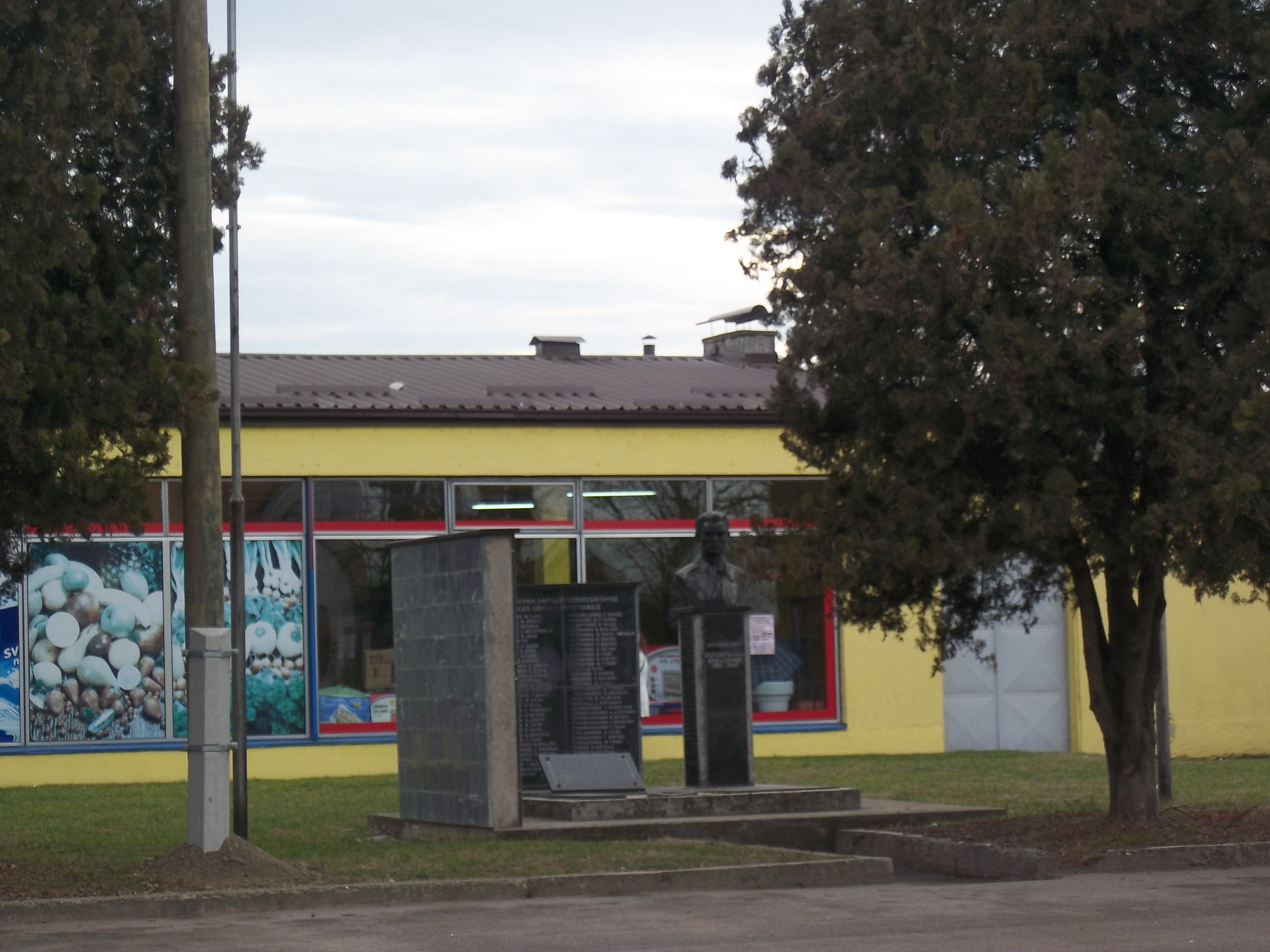 Spomenik borcima NOB-a u Boboti, u općini Trpinja.